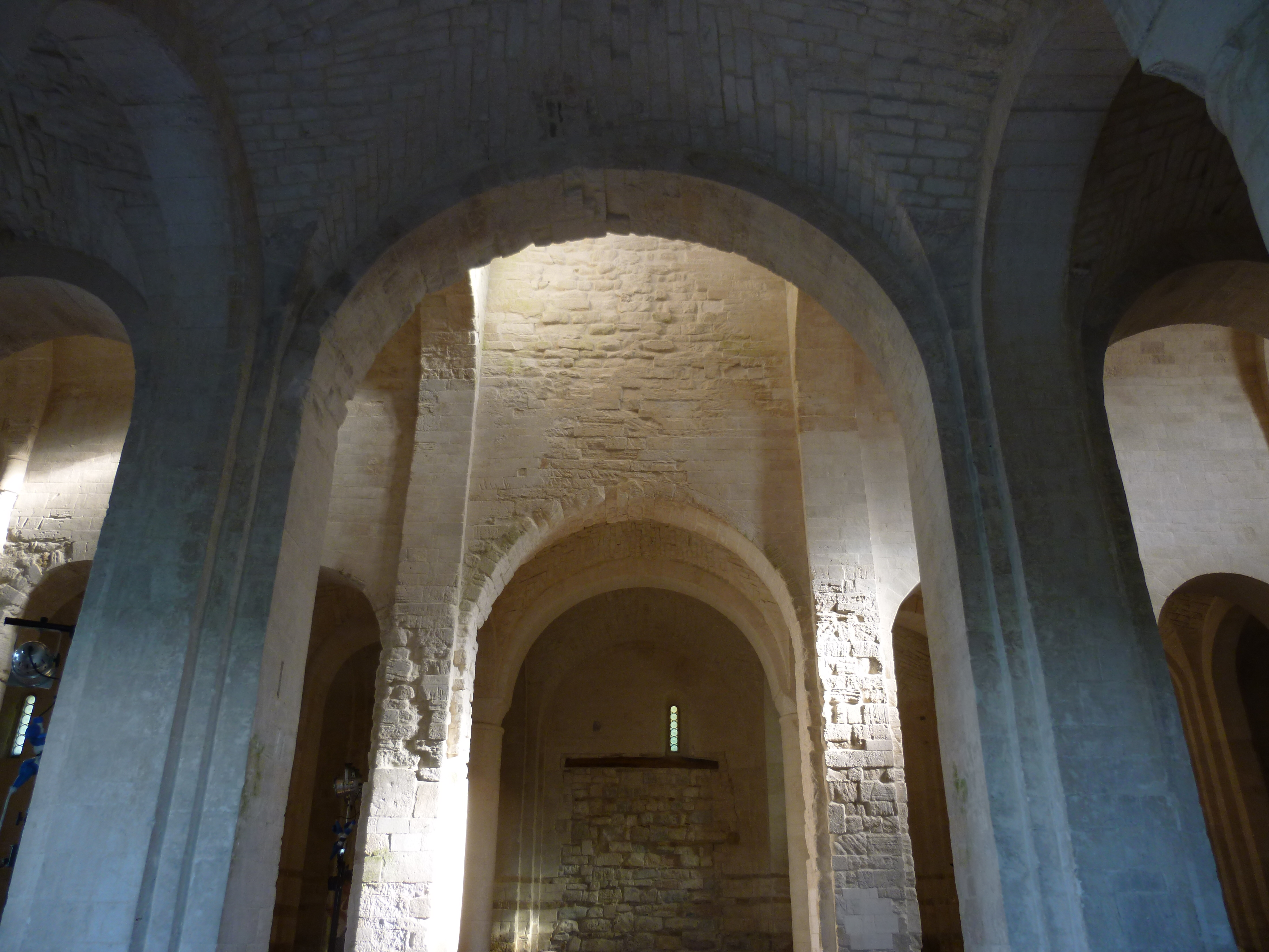 Chiesa di Santa Maria di Portonovo This is a photo of a monument which is part of cultural heritage of Italy.